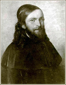 Lőw Lipót szegedi főrabbi (1811-1875) Leopold Löw rabbi in Szeged, Hungary (1811-1875)